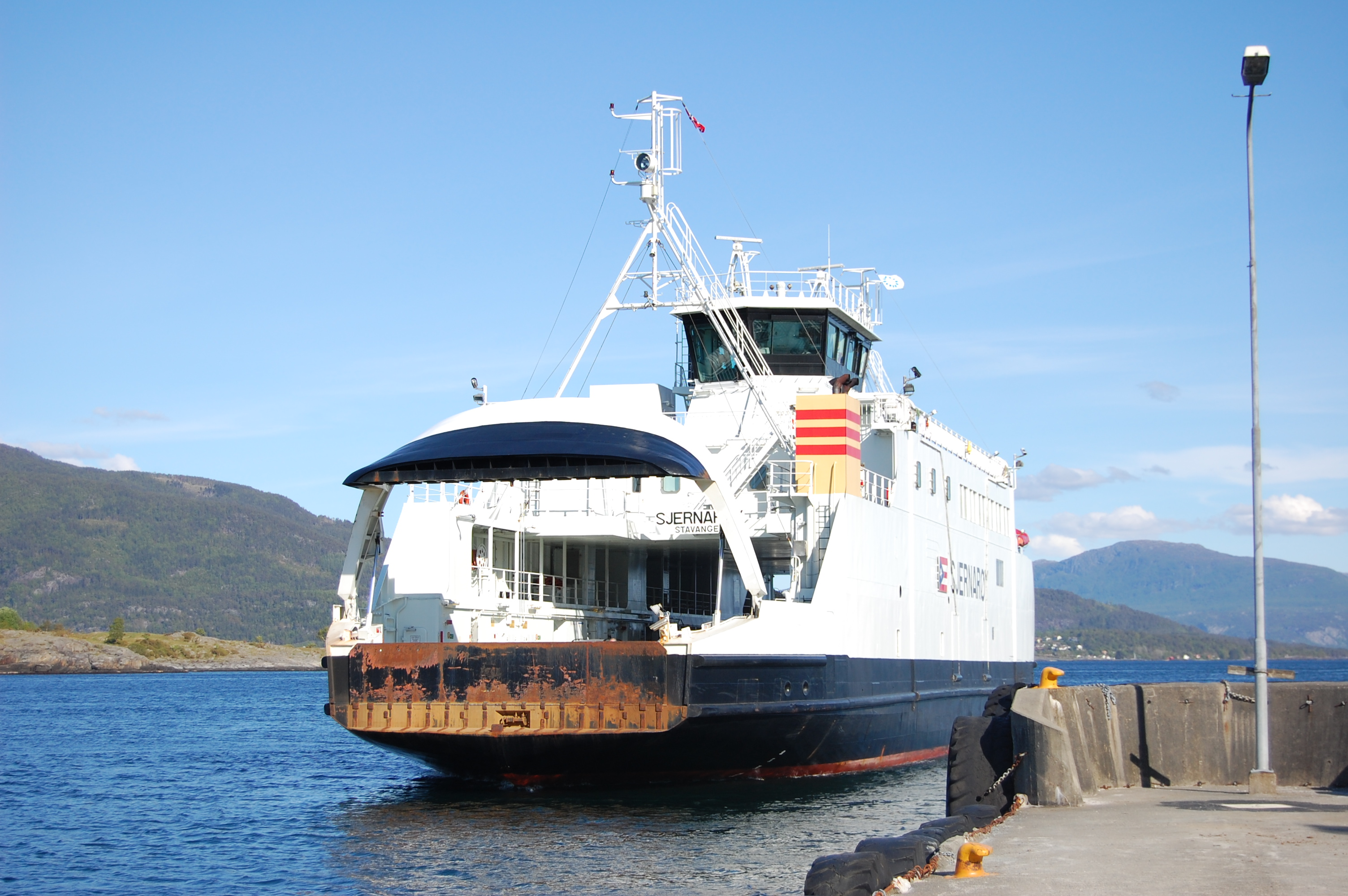 sjernaroy1